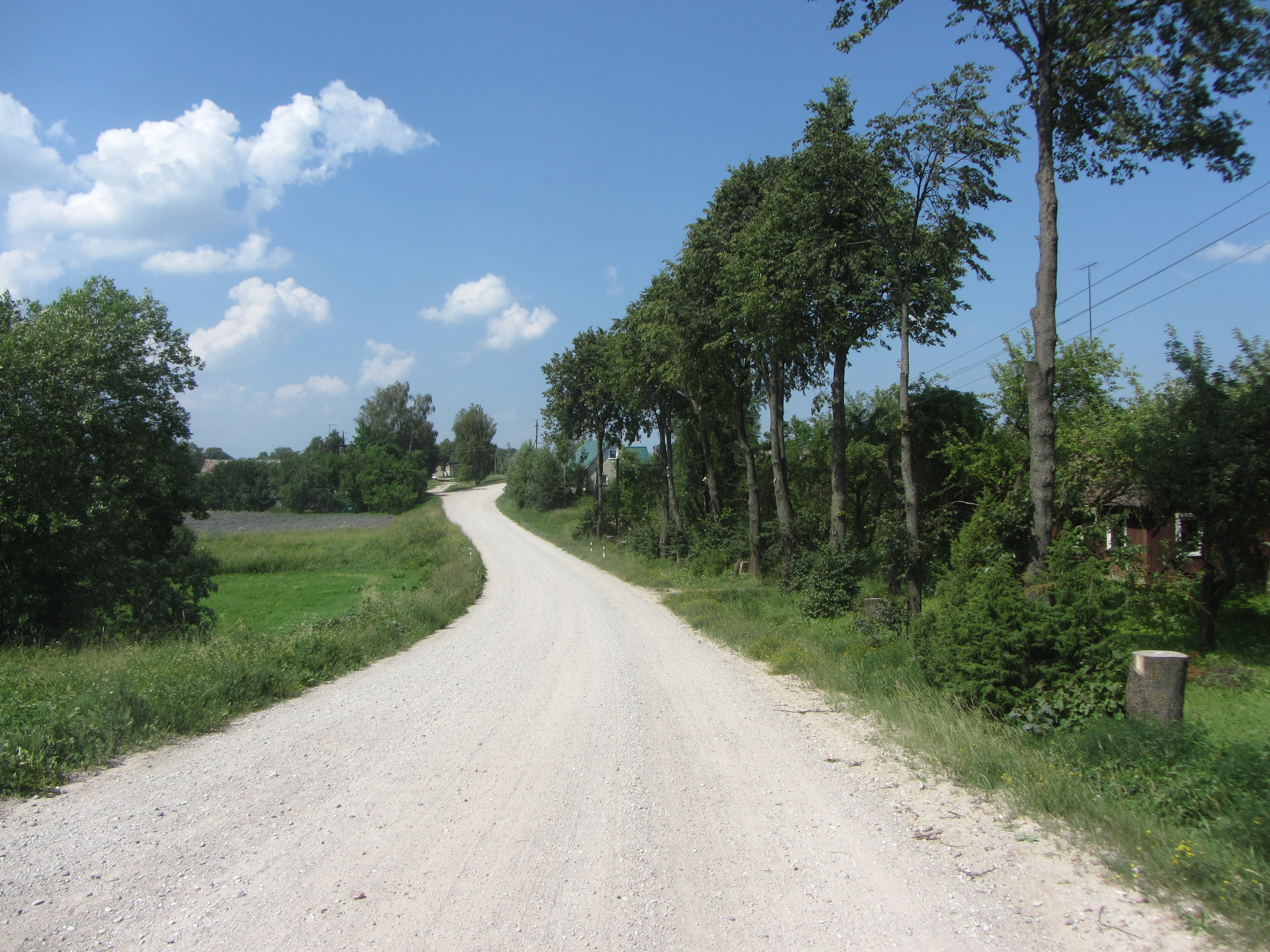 Seimeniškiai 67471, Lithuania